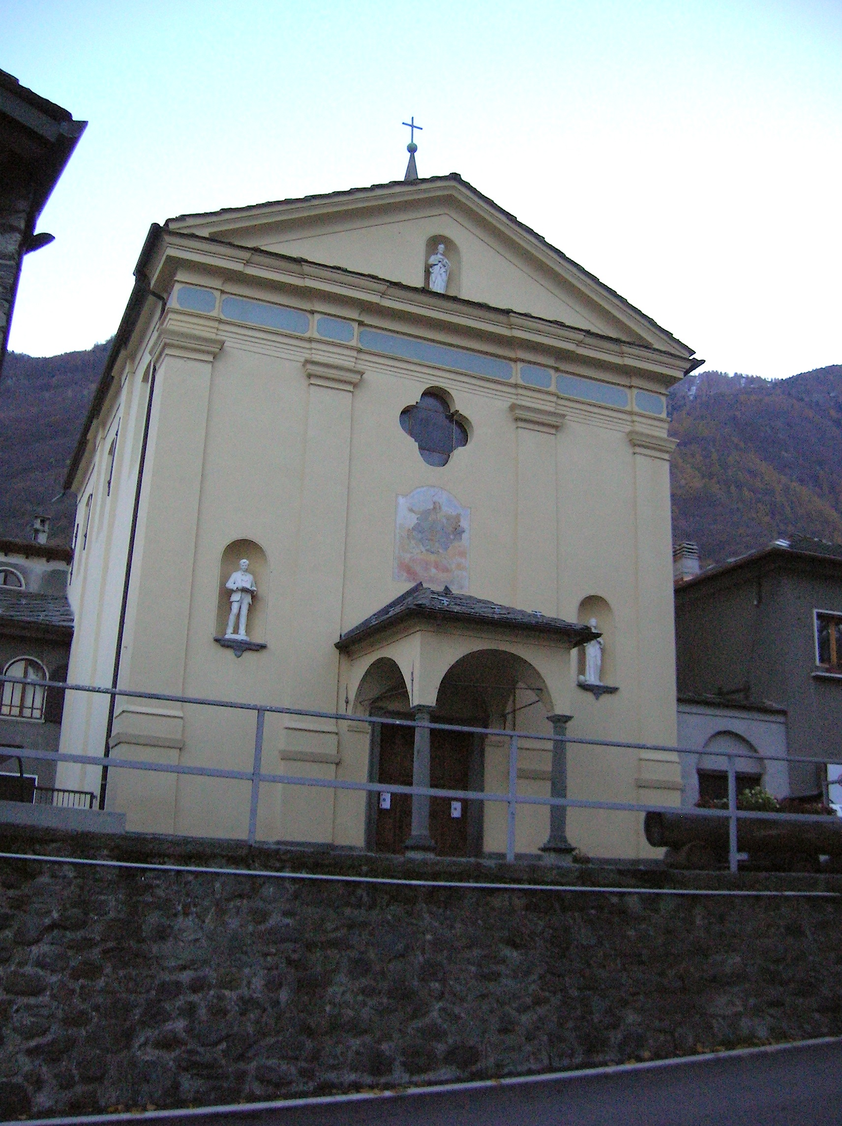 chiesa parrocchiale di Santa Maria Assunta. Issogne, Valle d'Aosta, Italia.